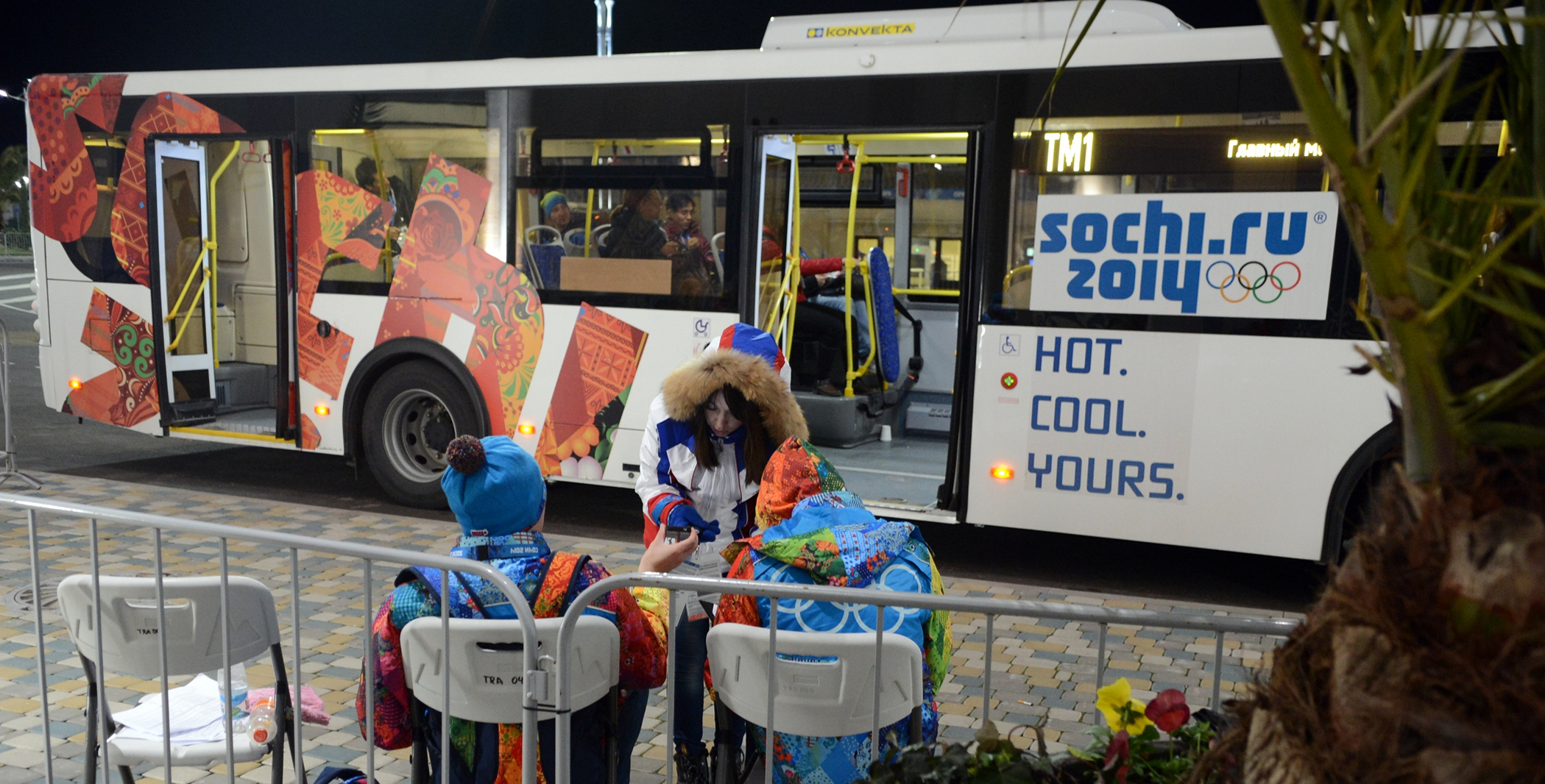 Организация транспорта на зимних Олимпийских играх 2014 в Сочи